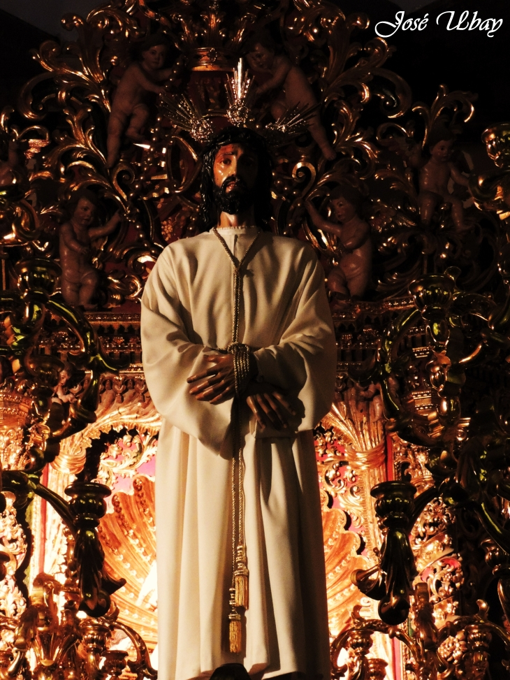 Nuestro Padre Jesús de la Salud (1985). José Paz Vélez. Parroquia de Santo Domingo de Guzmán - Las Palmas de Gran Canaria.